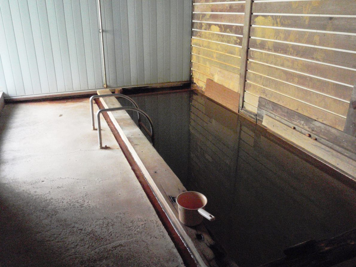 ニセコ薬師温泉の透明湯